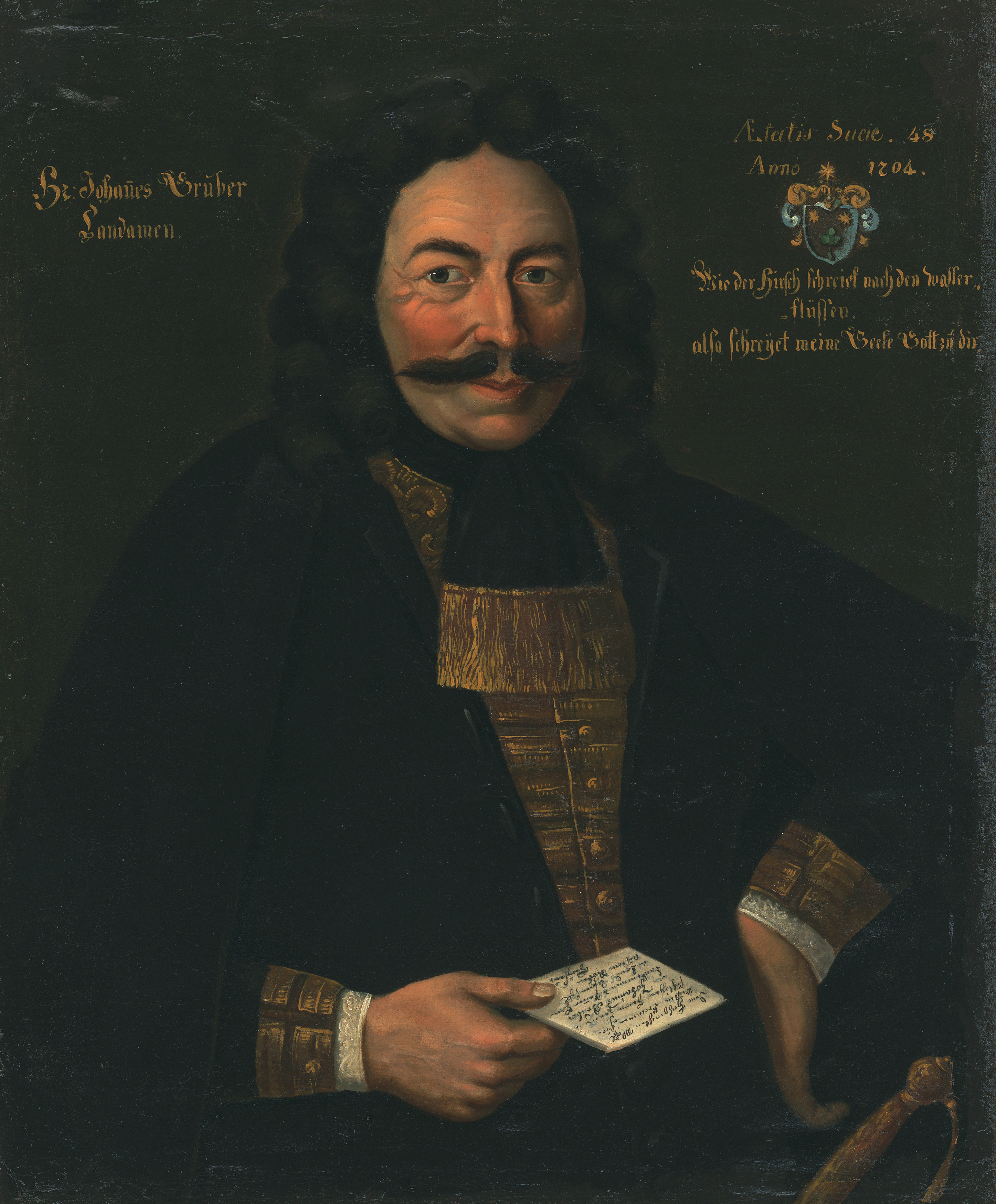 16. Landammann von Appenzell Ausserrhoden, Brustbildnis